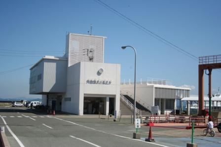 大島港のターミナル